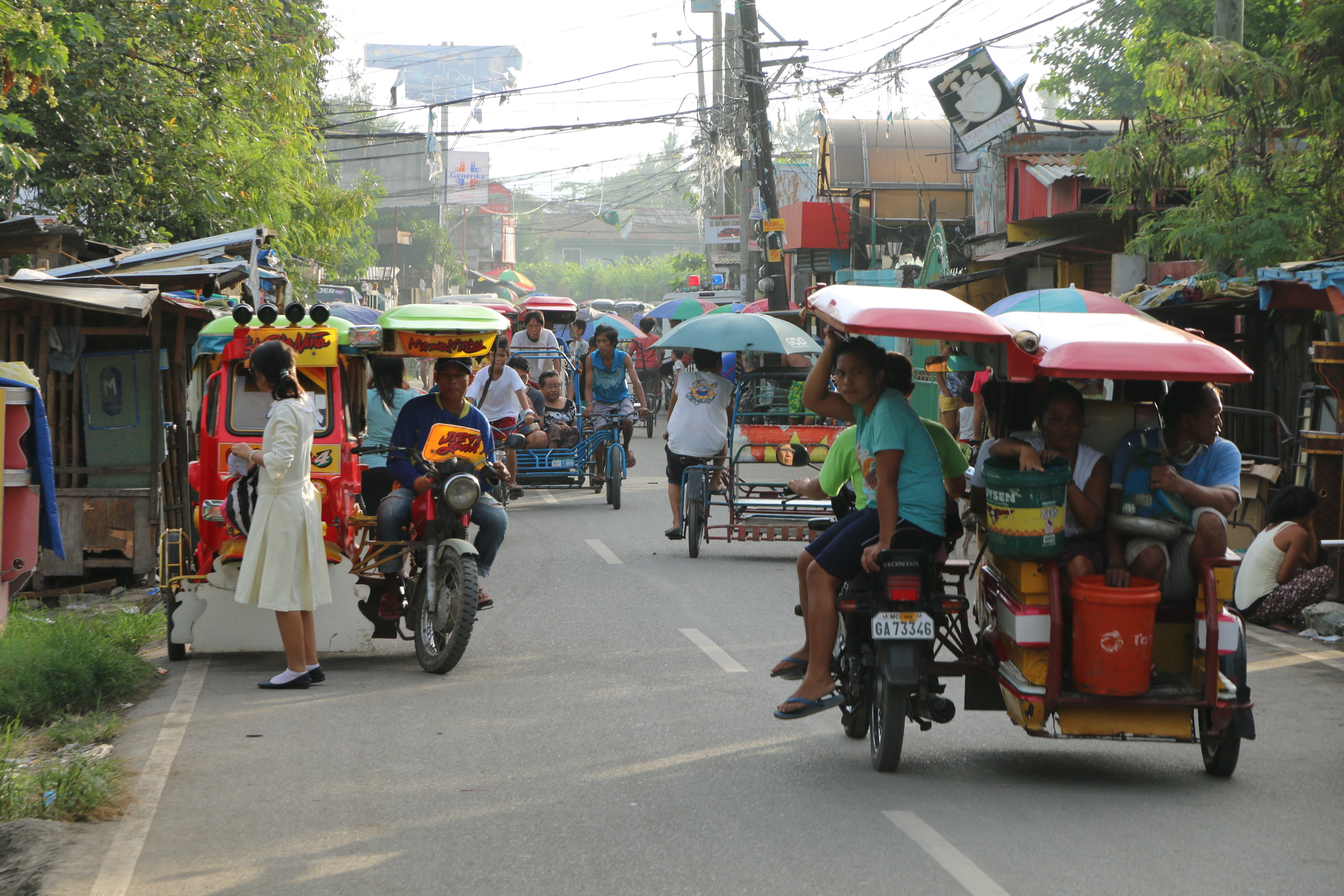 On the streets of Talisay in Cebu of August 2017